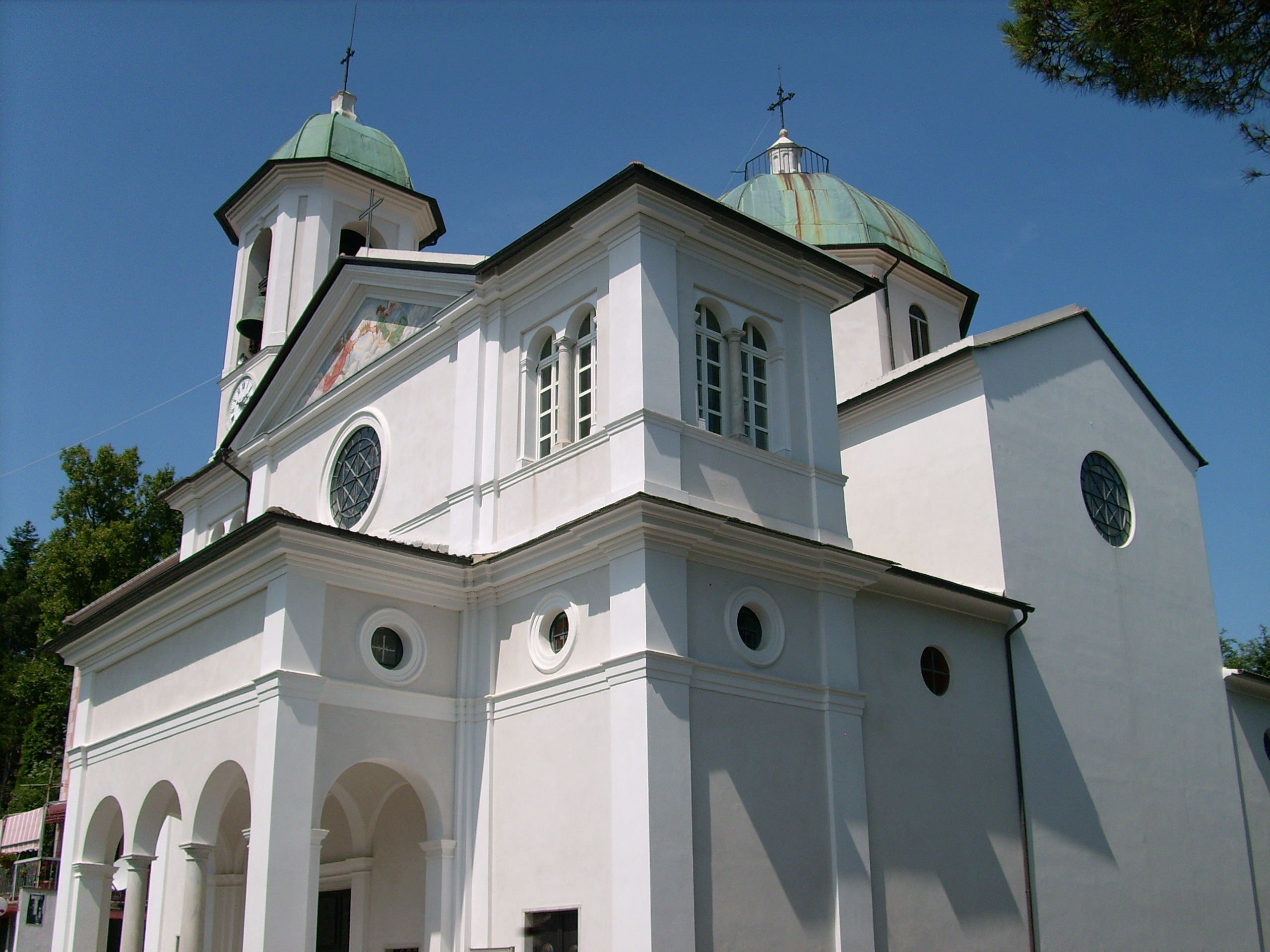 Santuario di Nostra Signora della Guardia a Velva, Castiglione Chiavarese, Liguria, Italia